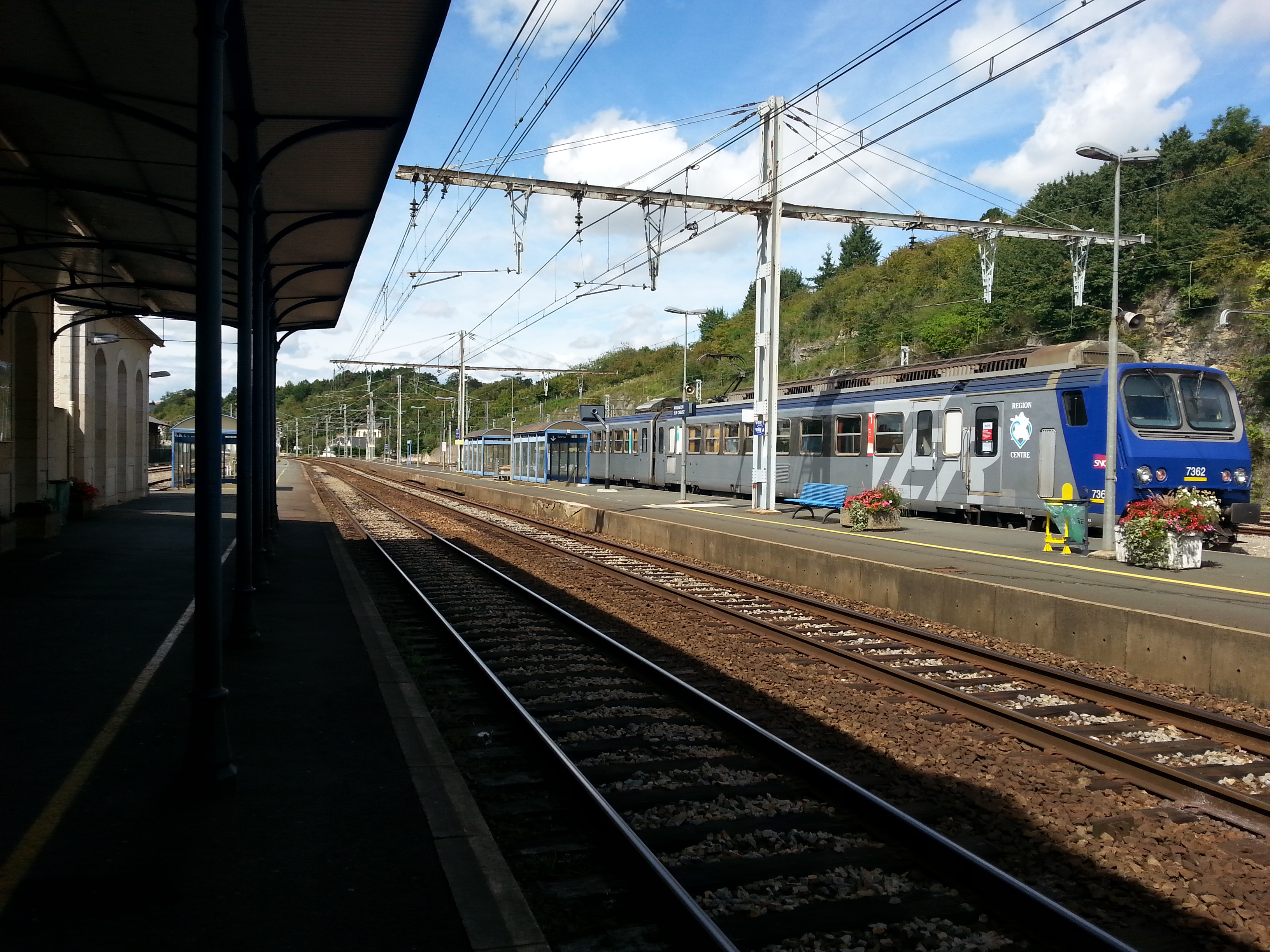 Gare d'Argenton-sur-Creuse (36) : Vue en direction de Châteauroux.